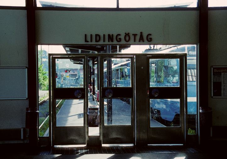 Entren till Lidingötågets station i Ropsten